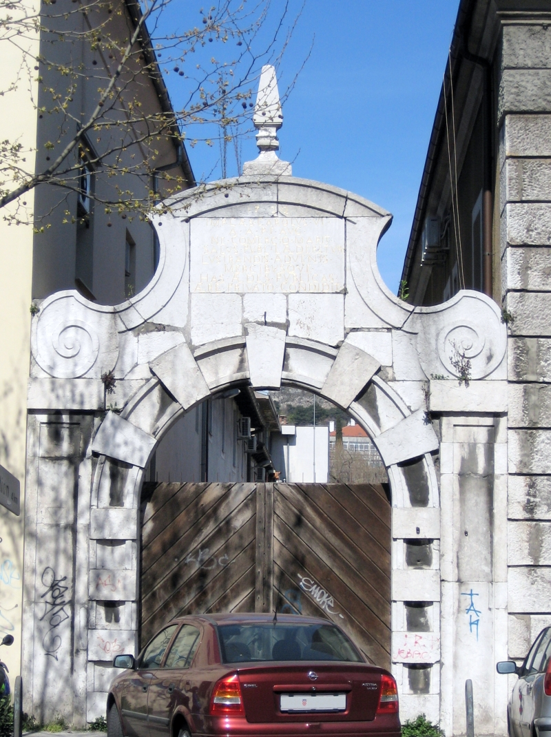 Ulaz u bivši lazaret koji je bio na samoj obali prije nasipavanja u Rijeci. Natpis na portalu: 1772 IMPERATOR CAES. CAROLUS VI A. A. P. T. AUGUSTUS NE COMERCIO MARIT. SALUS PUBLICA LAEDERETUR LUSTRANDIS ADVENIS MERCIBUSQUE HAS AEDES PUBLICAS AERE PRIVATO CONDIDIT